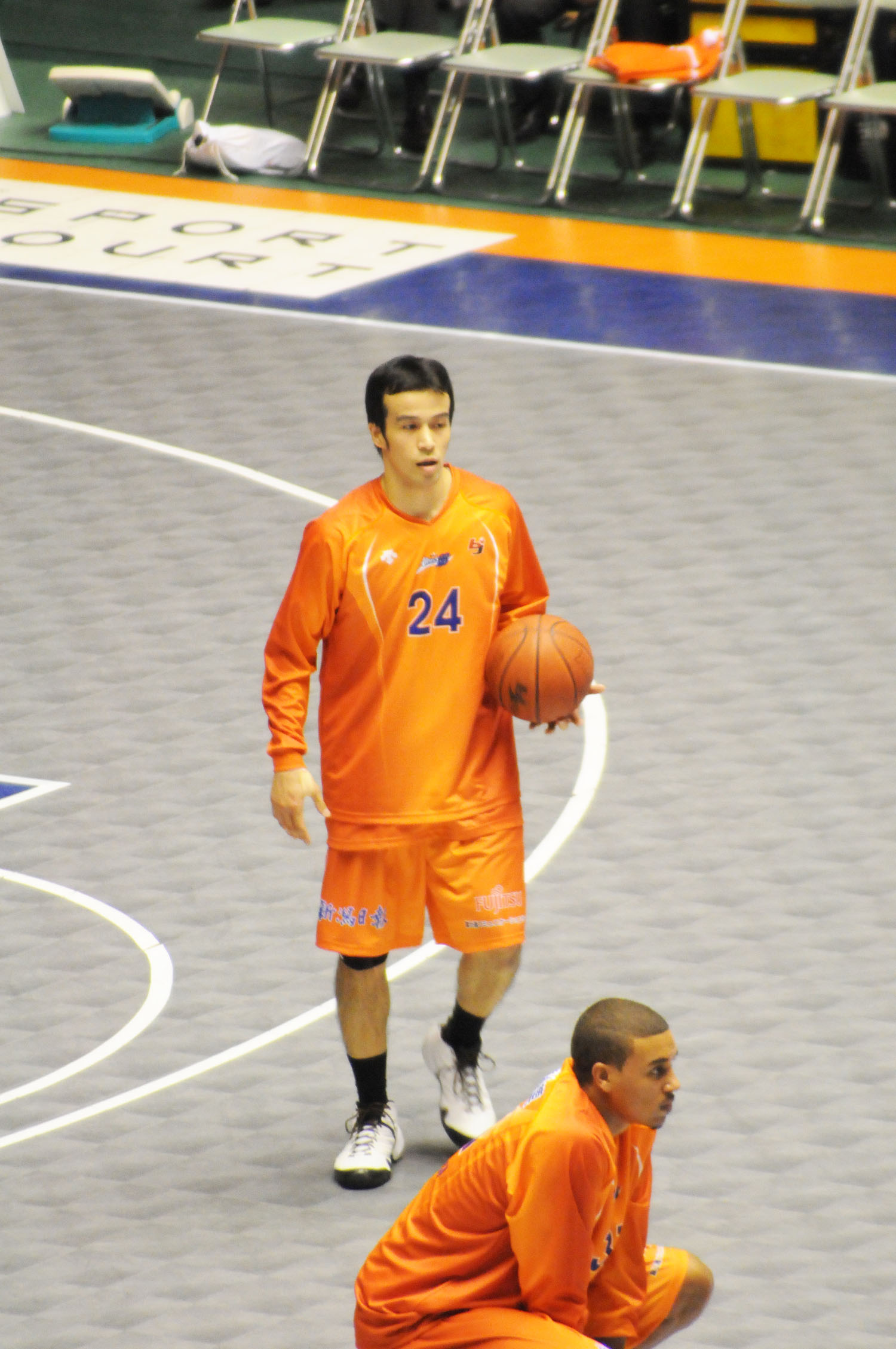 新潟アルビレックスBB、水町亮介選手。秋田県立体育館で。